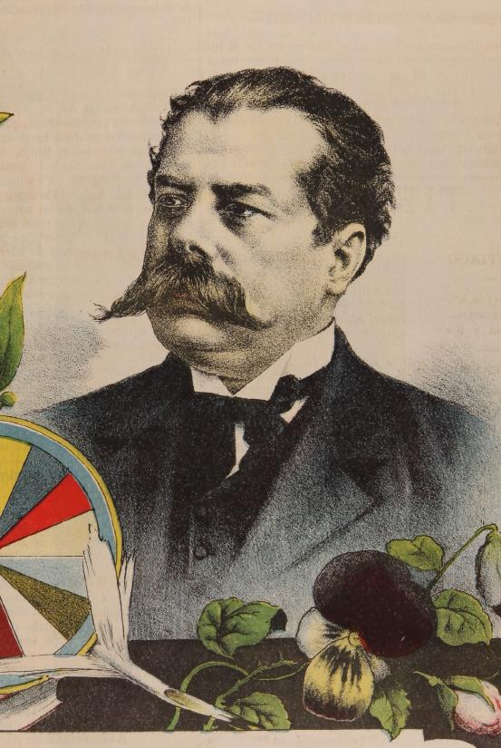 Pedro Pablo Figueroa Luna (Nació el 25 de diciembre de 1857 en Copiapó, Chile; Murió 1906 en Santiago) fue un escritor e investigador chileno. Se destaca su obra Diccionario biográfico de Chile, publicado en 1885.